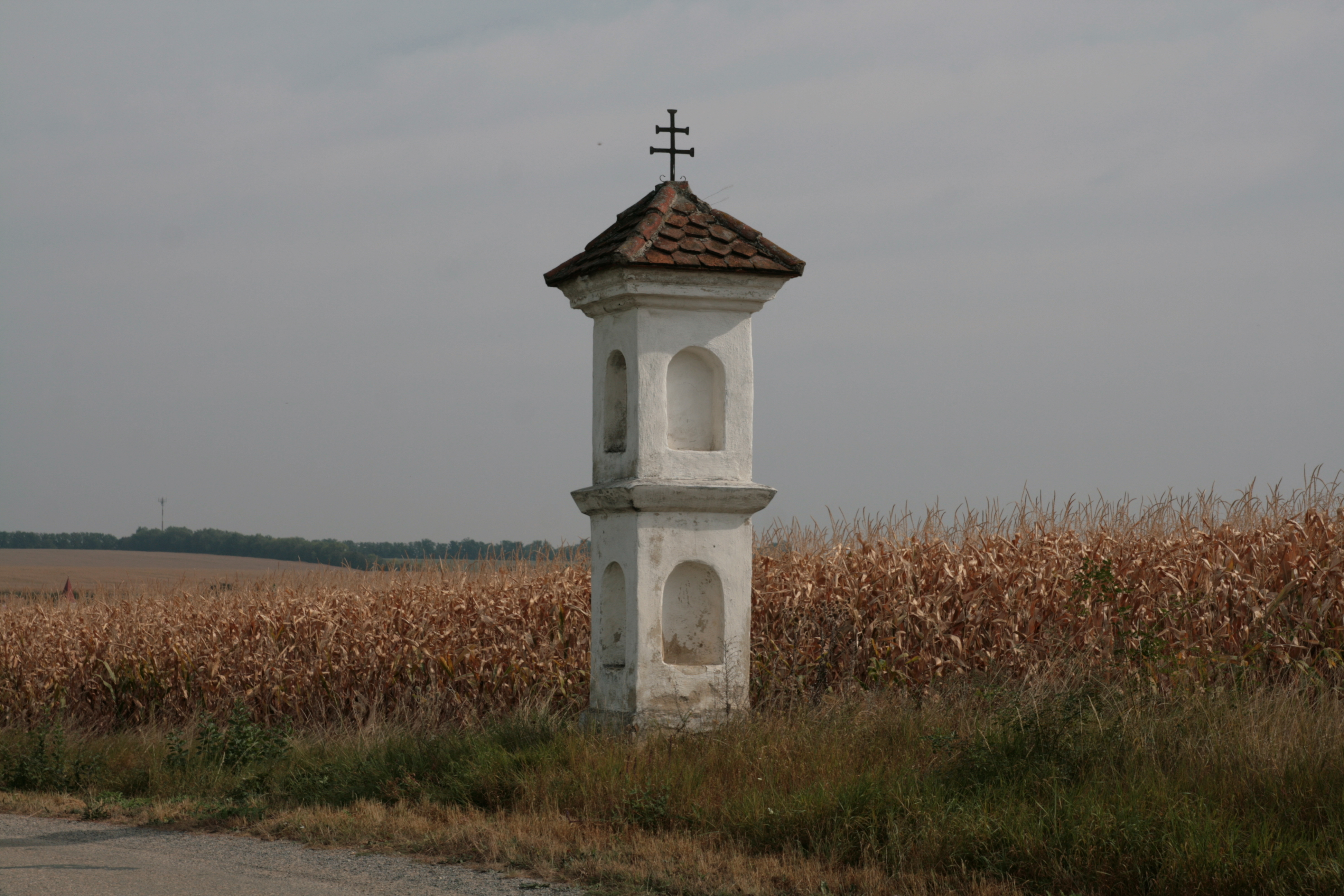 Obec Kubšice v okrese Znojmo, mezi Pohořelicemi a Moravským Krumlovem. Boží muka u silnice na Olbramovice, nedaleko jihozápadního okraje katastru.